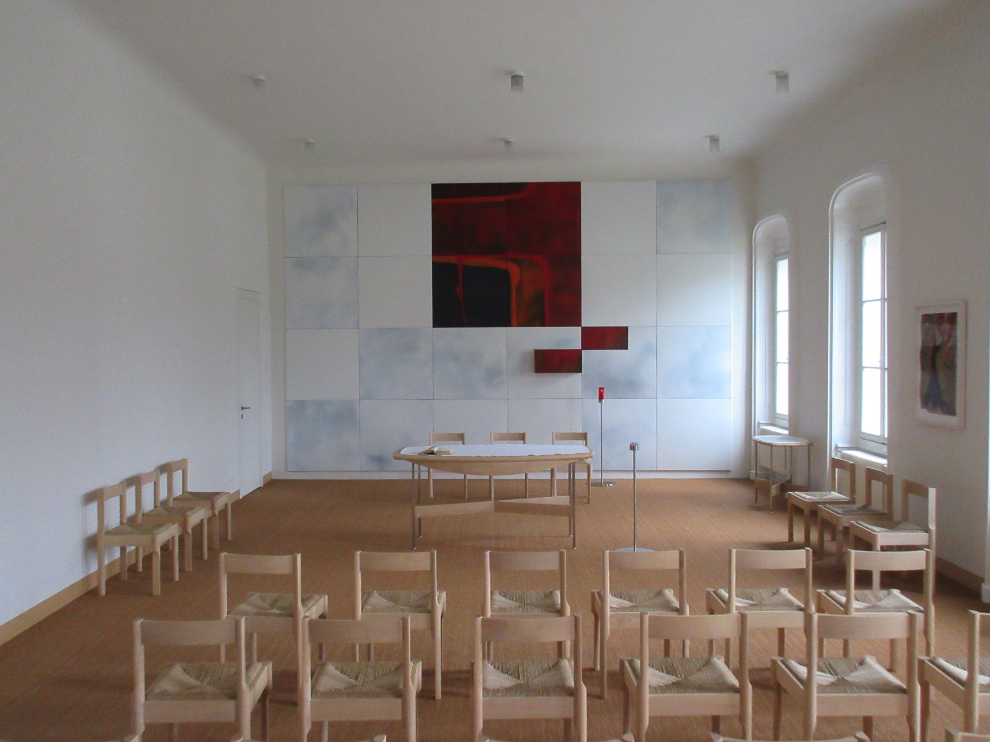 Kapelle des Kardinal-König-Hauses am Kardinal König-Platz 2 / Lainzer Straße in Wien-Hietzing